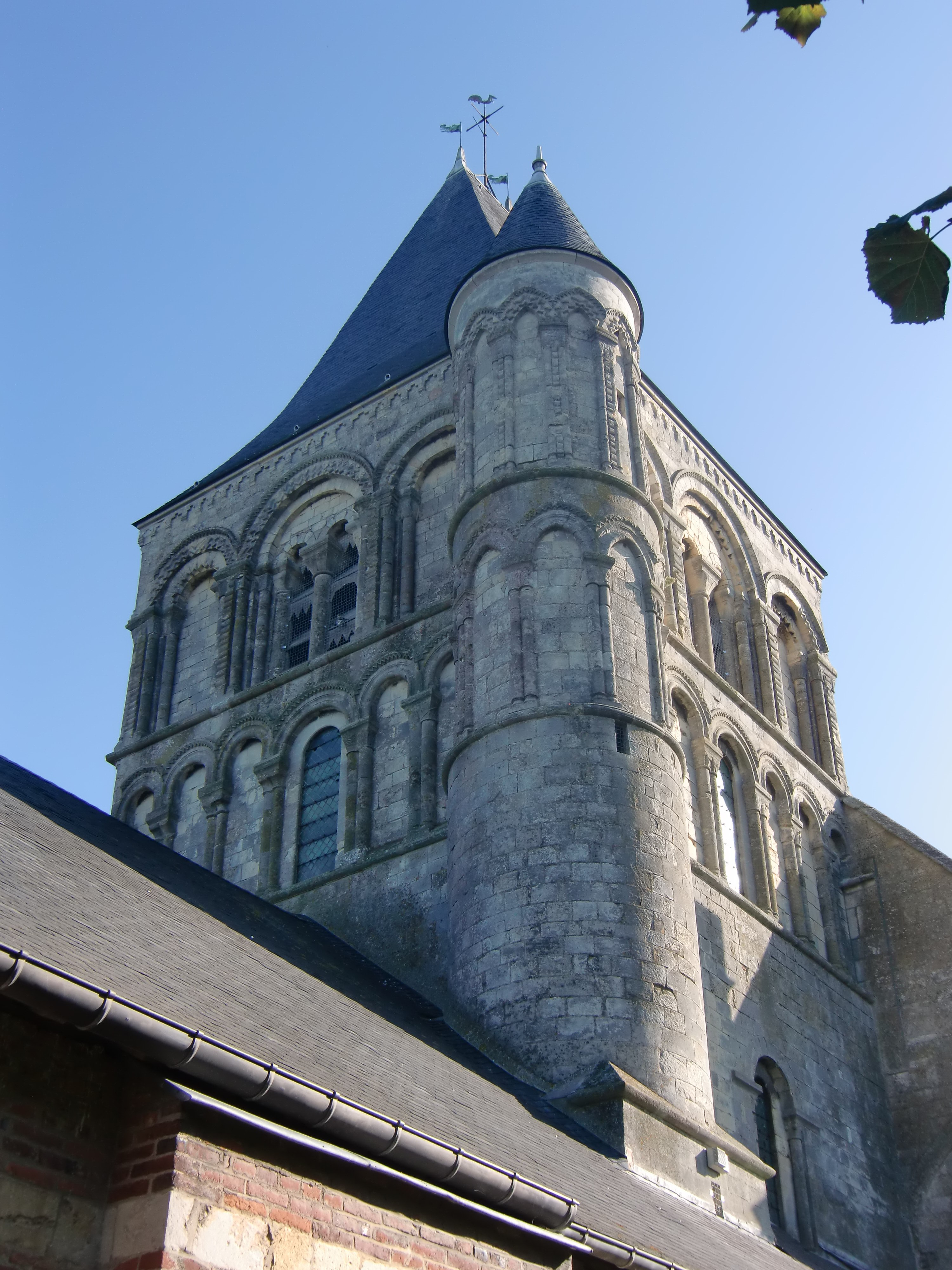 Eglise de Quillebeuf (Eure, Normandie, France)